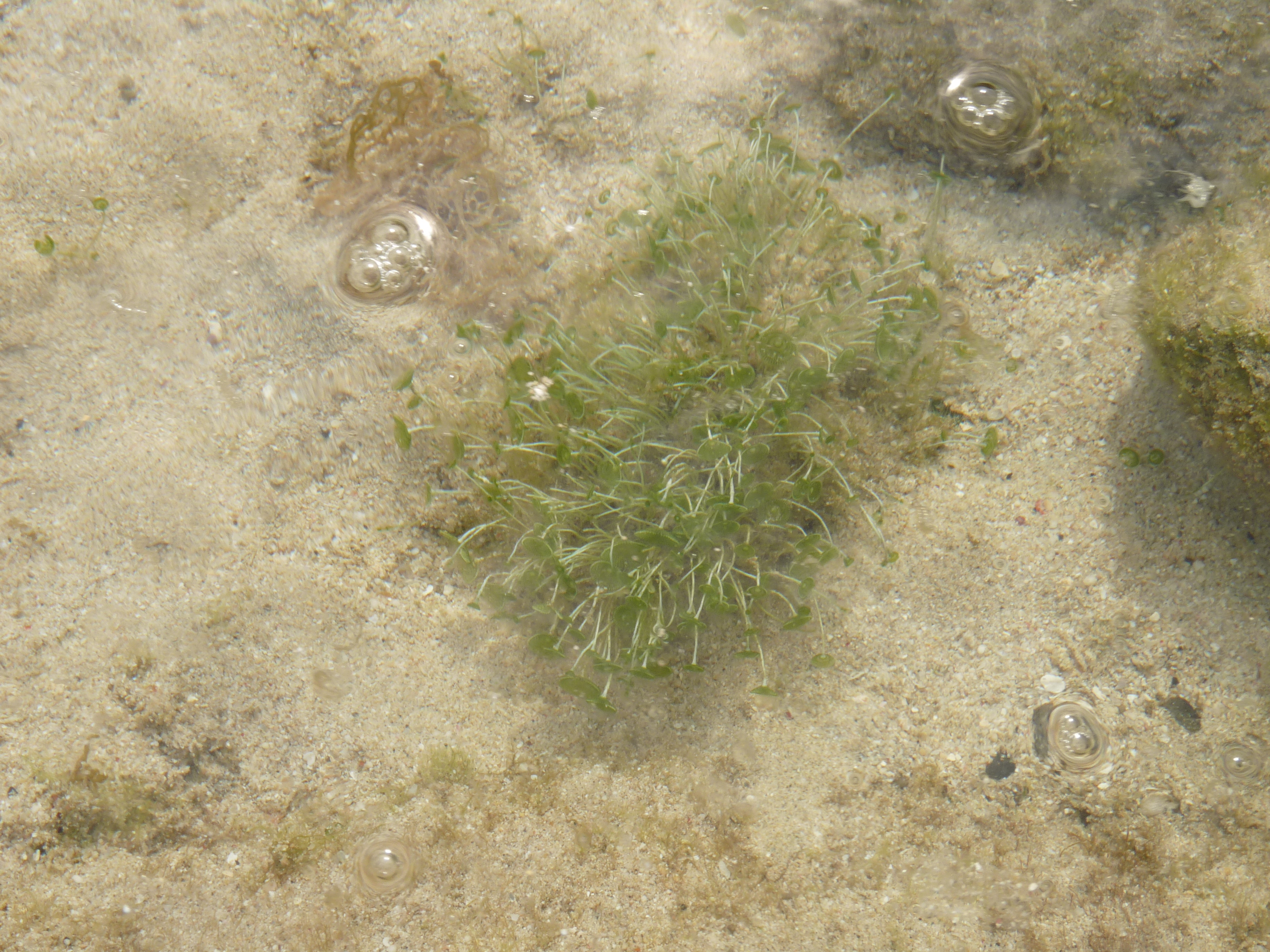 カサノリ（Acetabularia ryukyuensis）